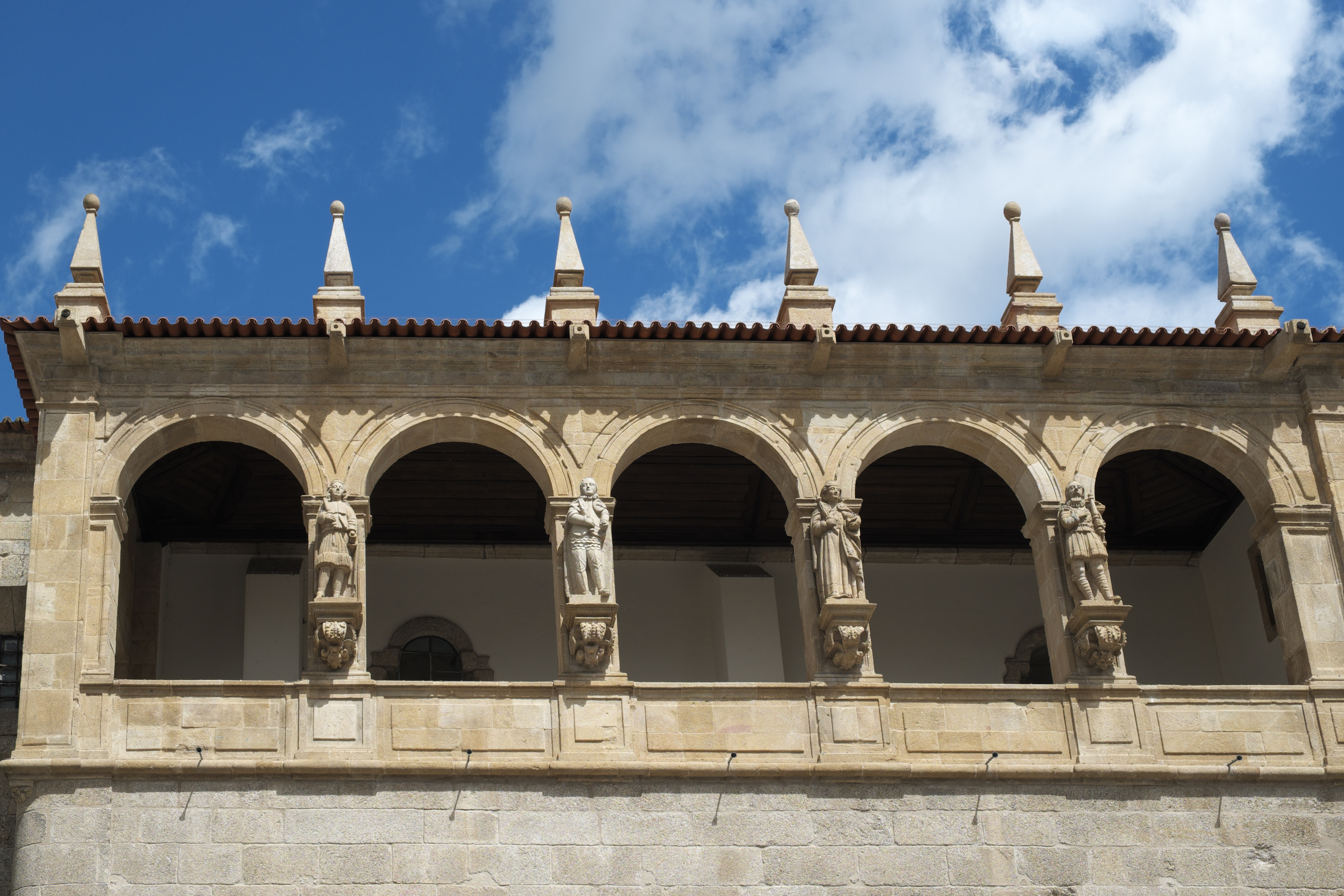 Klosterkirche São Gonçalo in Amarante im Distrikt Porto (Nordportugal), Königsloge